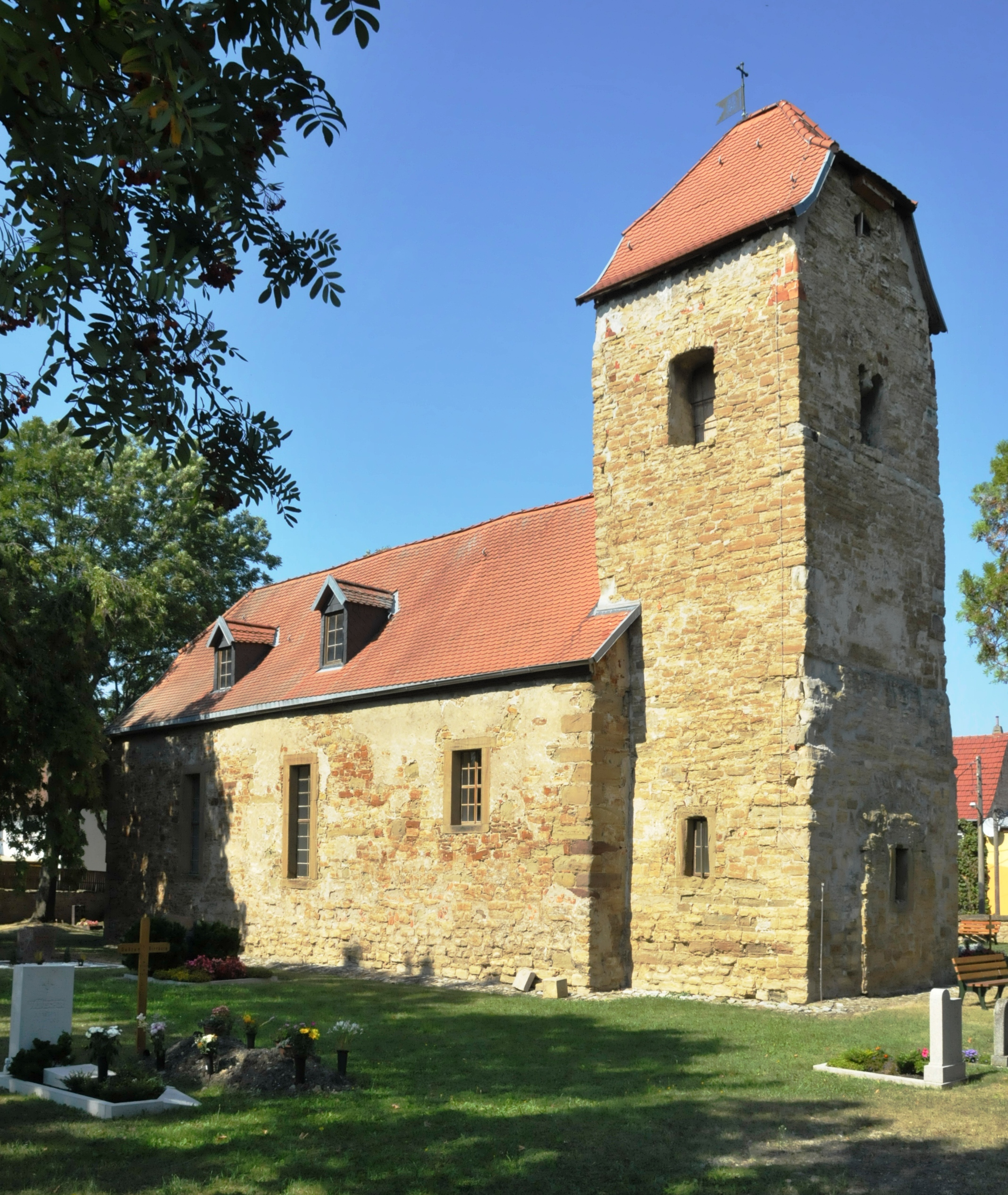 Rohrborn, St.-Michael-Kirche